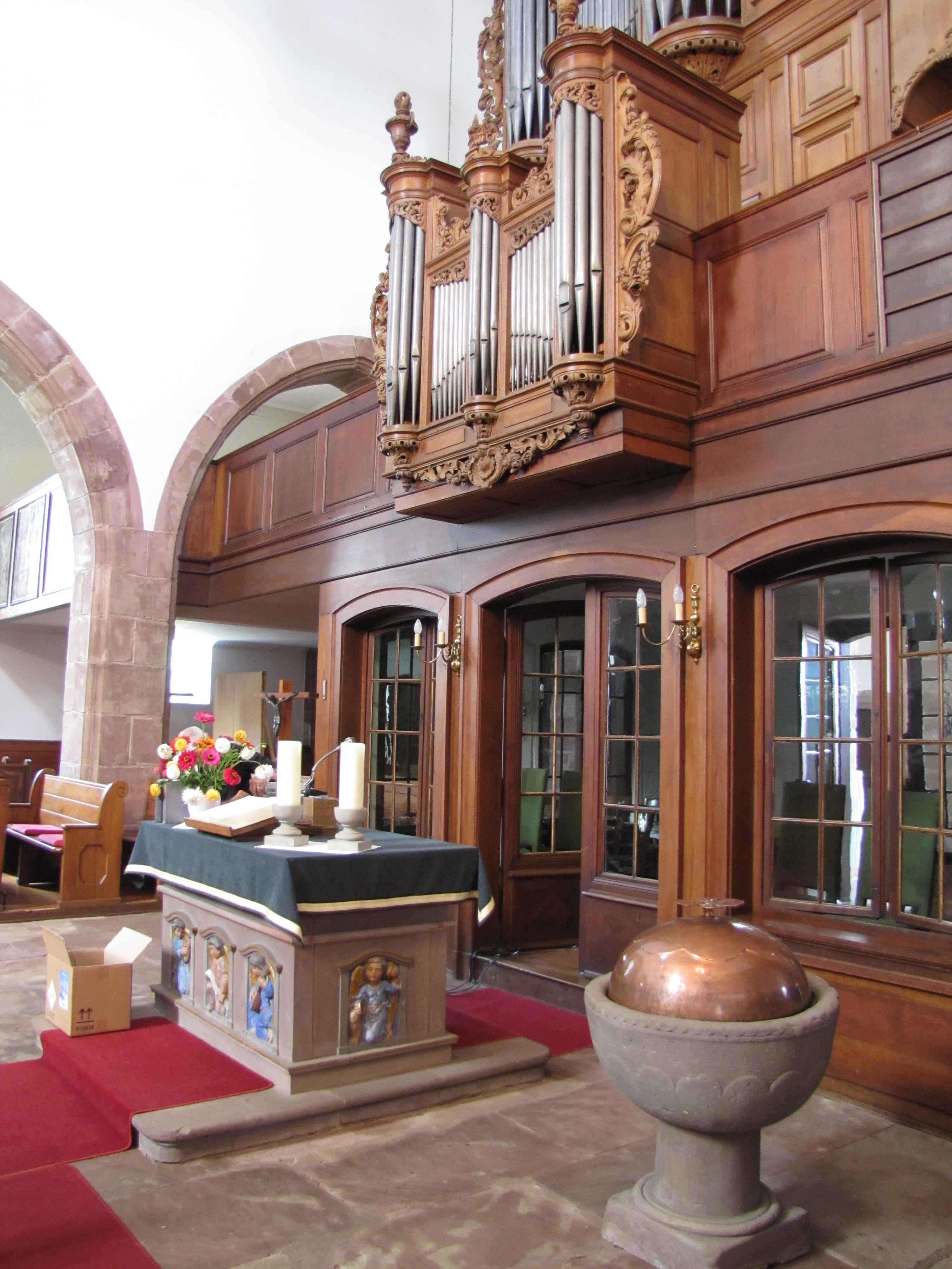 Alsace, Bas-Rhin, Église protestante de Bouxwiller (PA00084645, IA67009578). Loge des Comtes de Hanau-Lichtenberg (1613) Autel protestant (1912): Fonts baptismaux (XVIIIe): Orgue Jean André Silbermann (1778): This object is classé Monument Historique in the base Palissy, database of the French furniture patrimony of the French ministry of culture, under the references PM67000998, IM67013997 and buffet PM67000495 buffet.